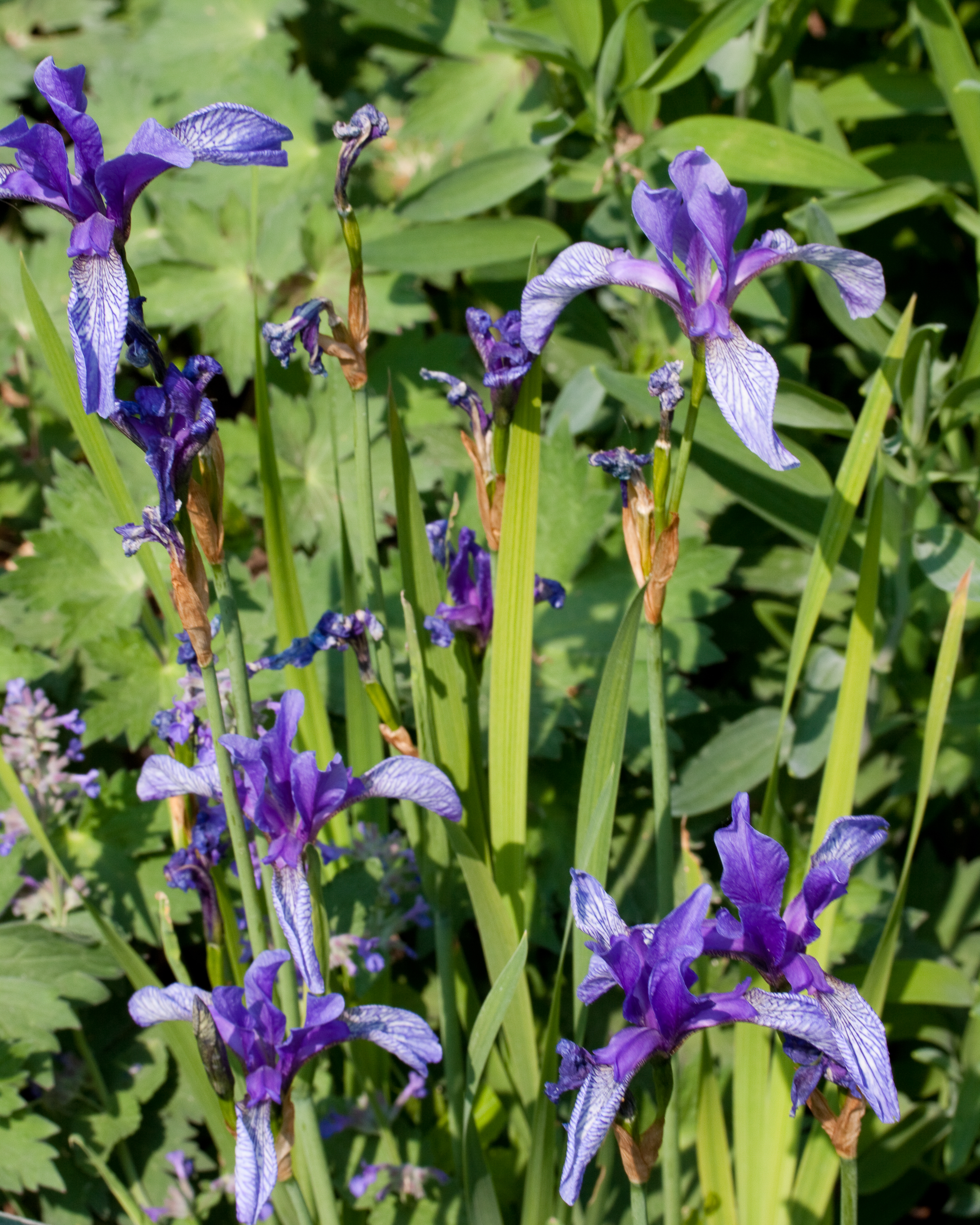 Jardin des Plantes - Paris